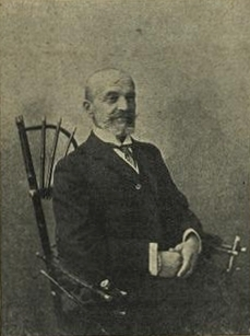 граф Иван Викторович Канкрин, русский государственный деятель, бессарабский губернатор, сенатор.